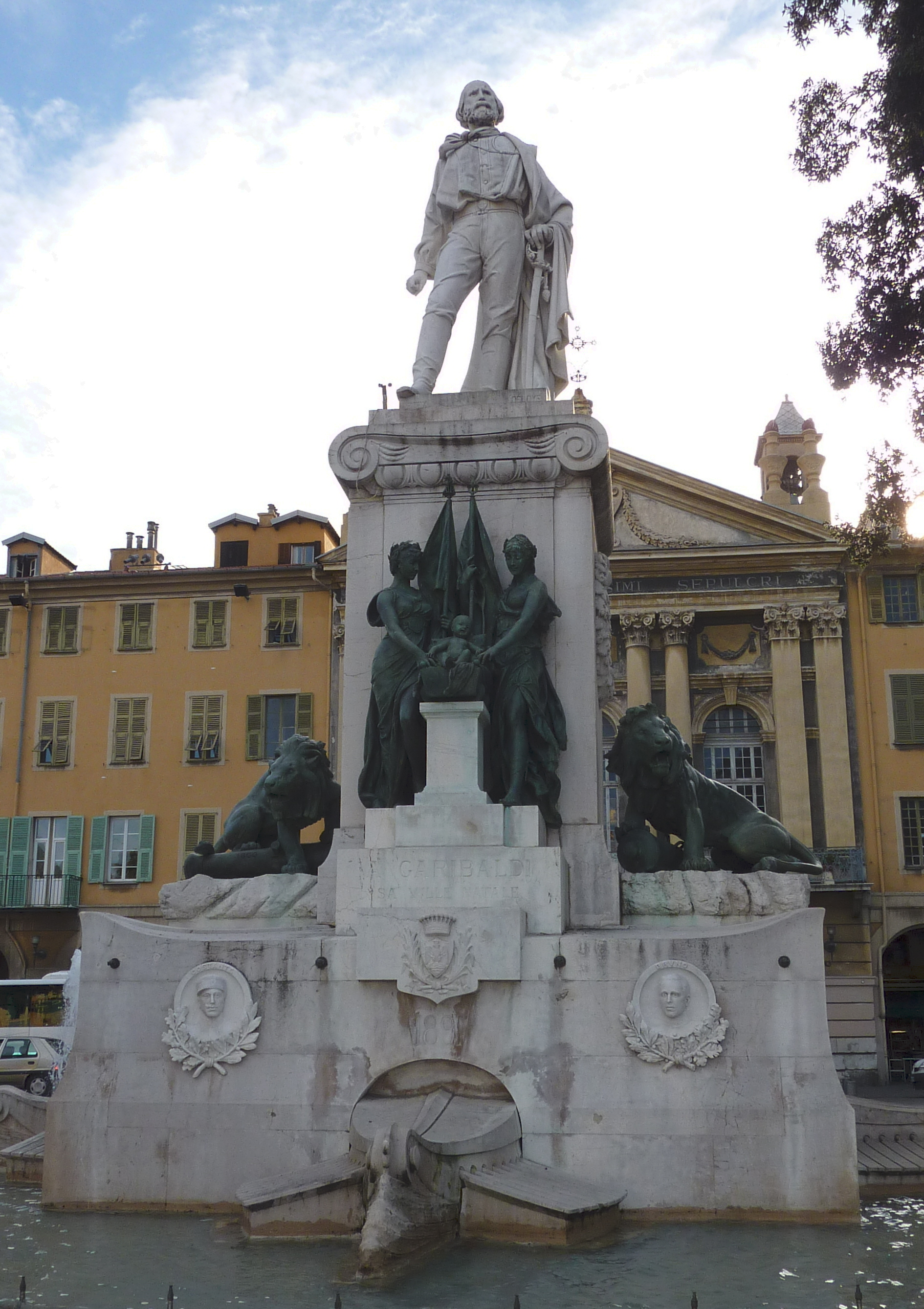 Monumento a Giuseppe Garibaldi en Niza, ciudad donde nació